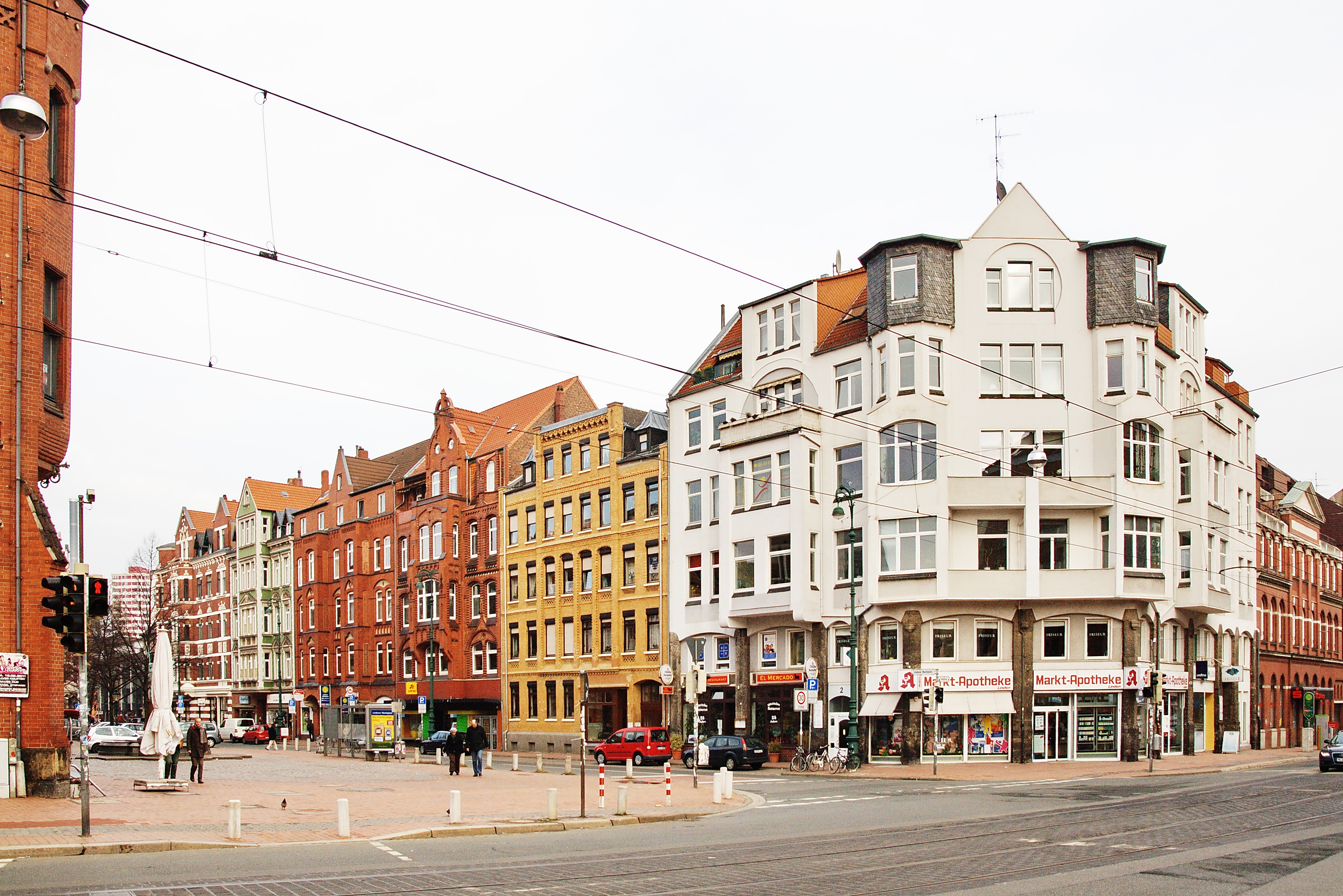 Geburtshaus der Publizistin Hannah Arendt am Lindener Marktplatz 2 (Hannover), Niedersachsen, Deutschland